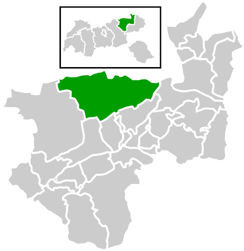 Lage der Gemeinde innerhalb des Bezirks Kufstein